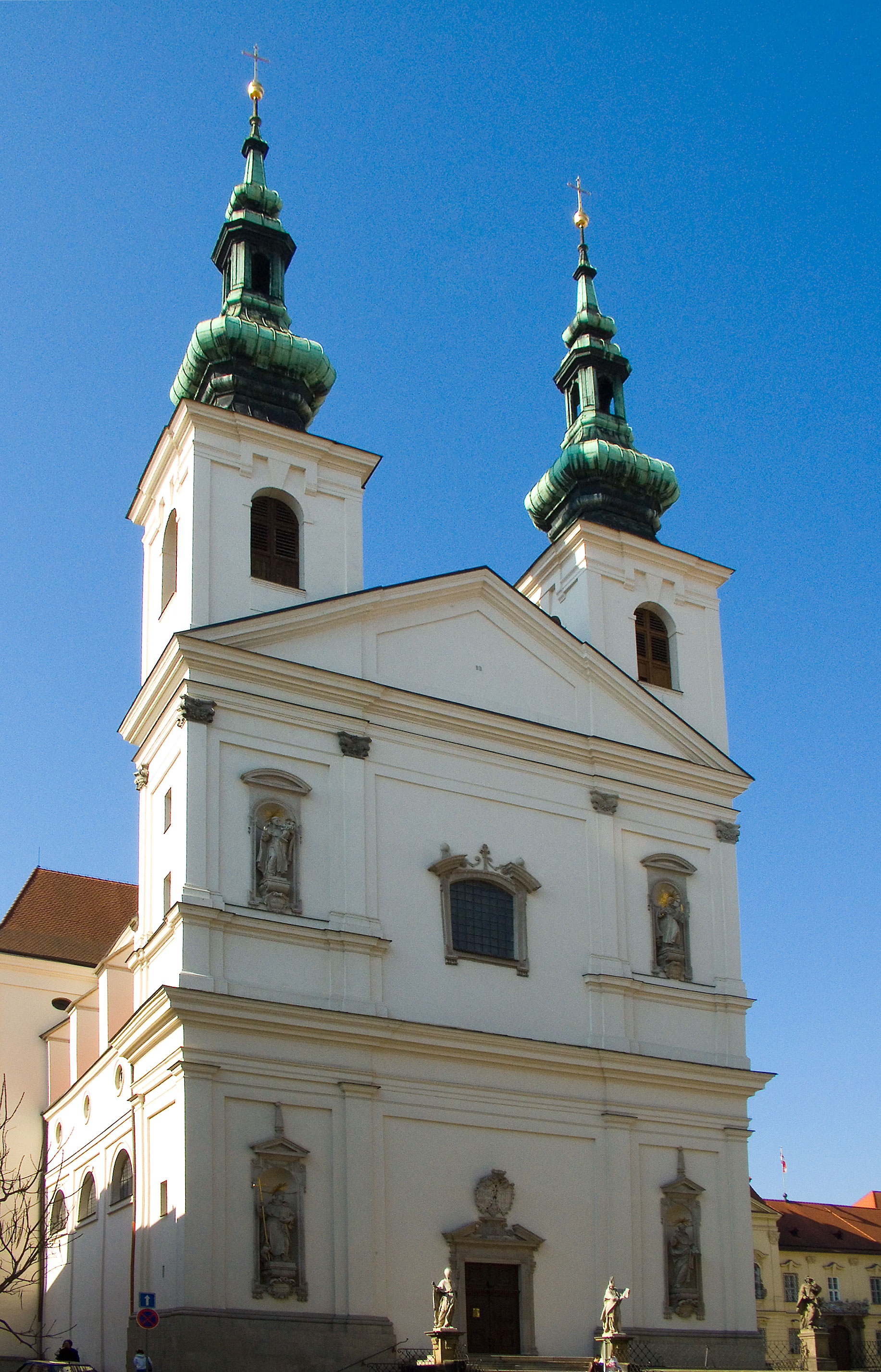 Kostel svatého Michala v Brně